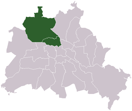 Berlin, Germany – after WWII, French zone